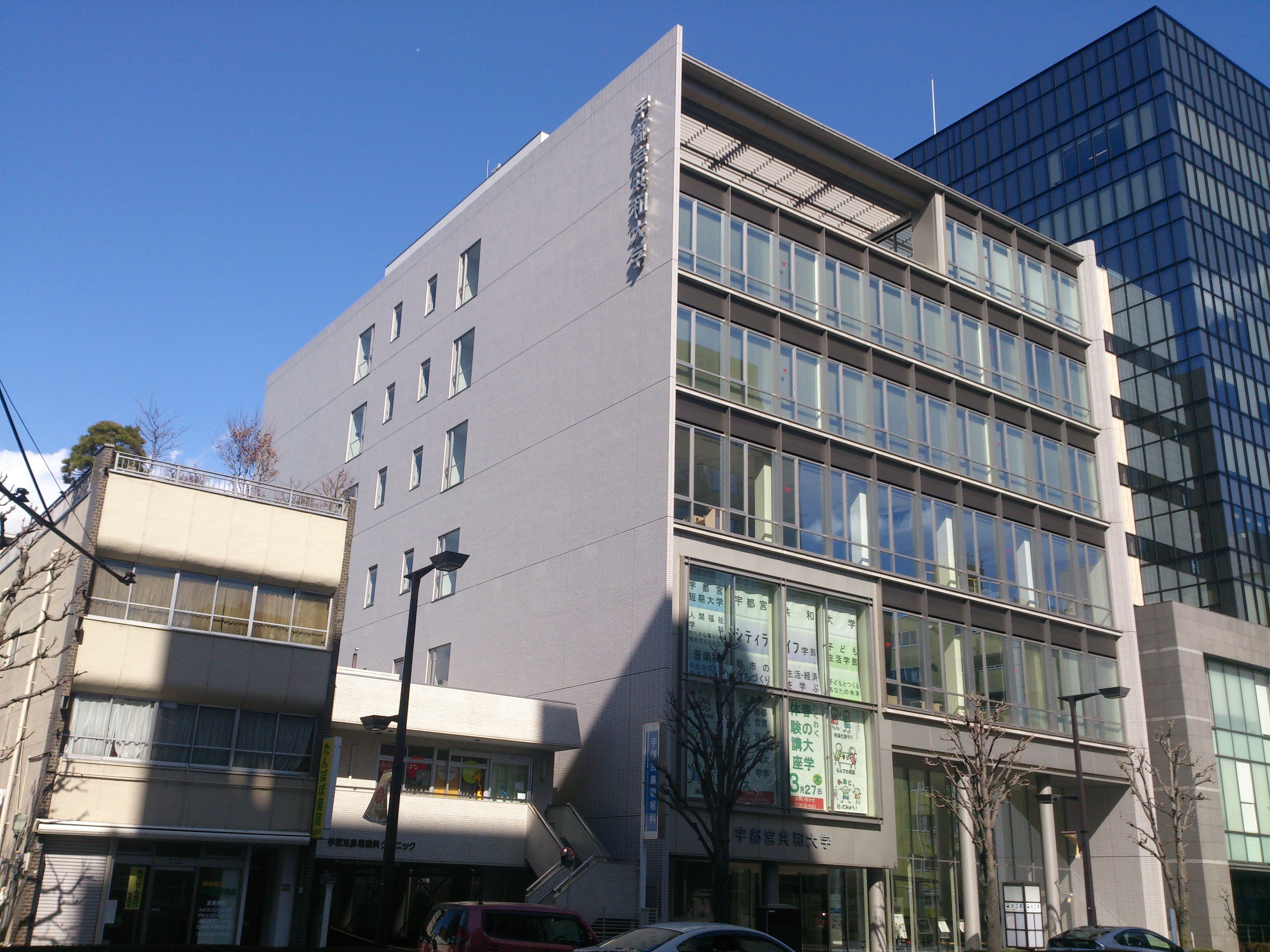 宇都宮共和大学